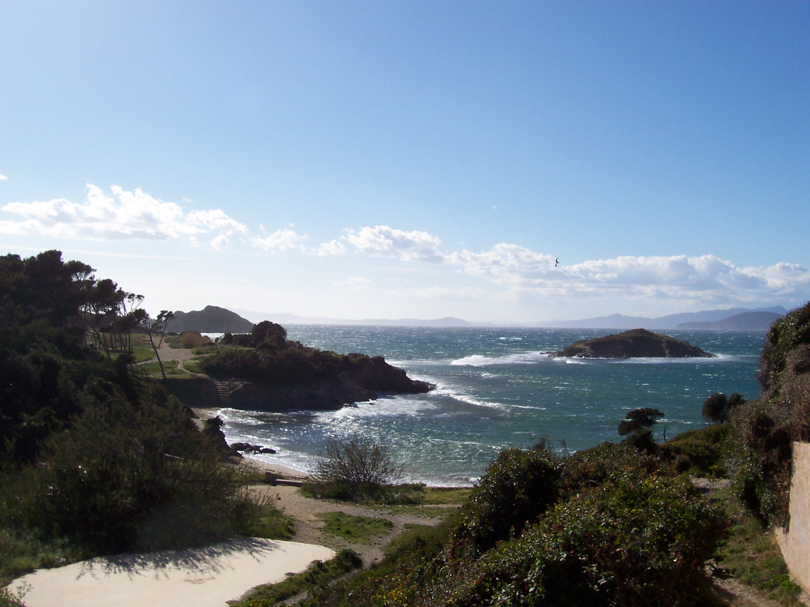 Presqu'île de Giens - Vue de la pointe ouest de la presqu'île